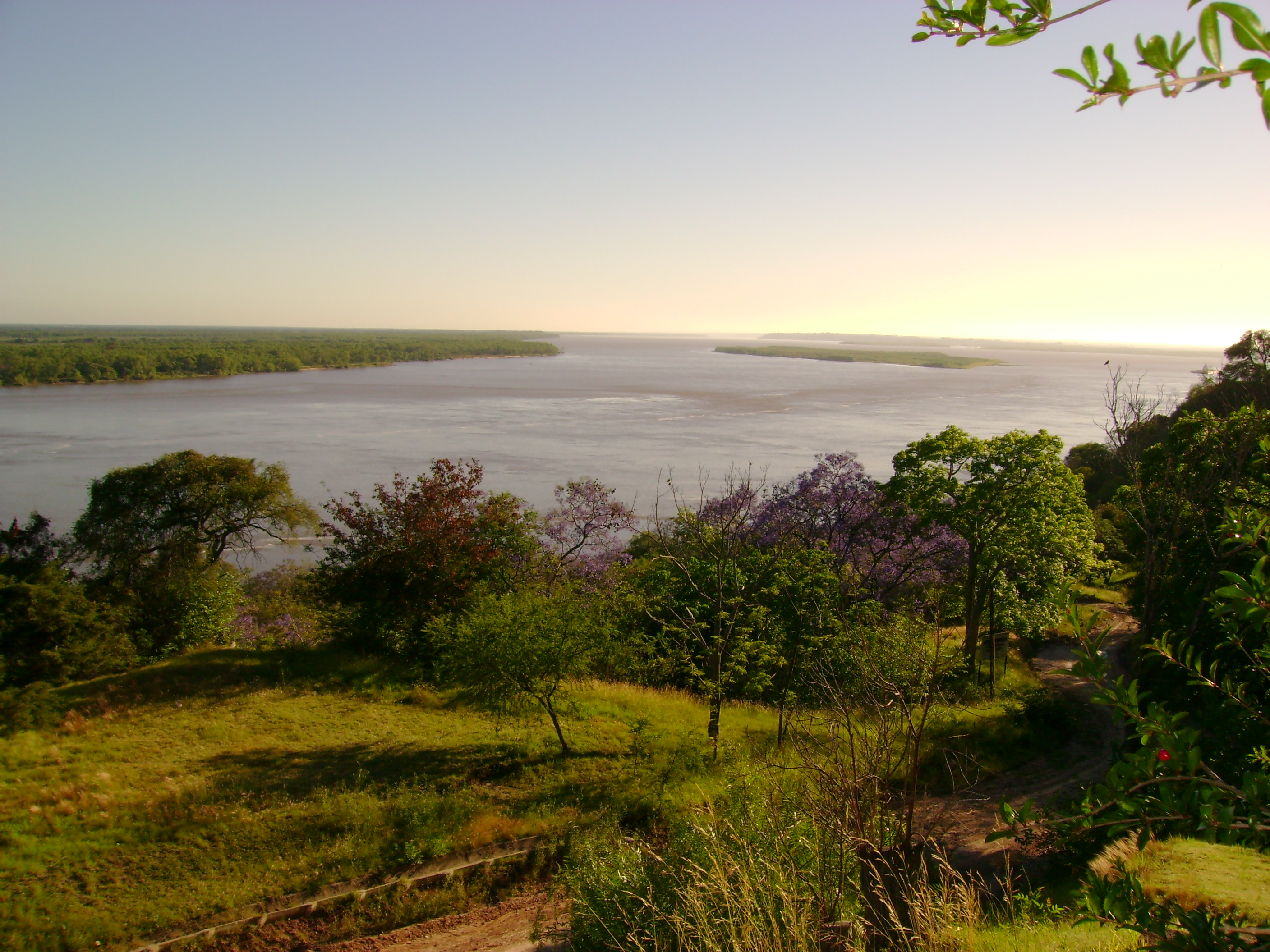 Vista del río Paraná desde las barrancas de la Toma Vieja de la ciudad de Paraná